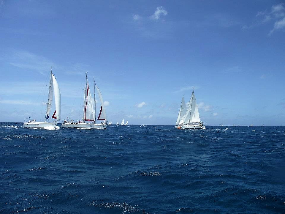 Esta imagen la tome en el evento de sailing week en Antigua en el 2012. Yo vivo en Antigua y Barbuda desde hace 8 anos.